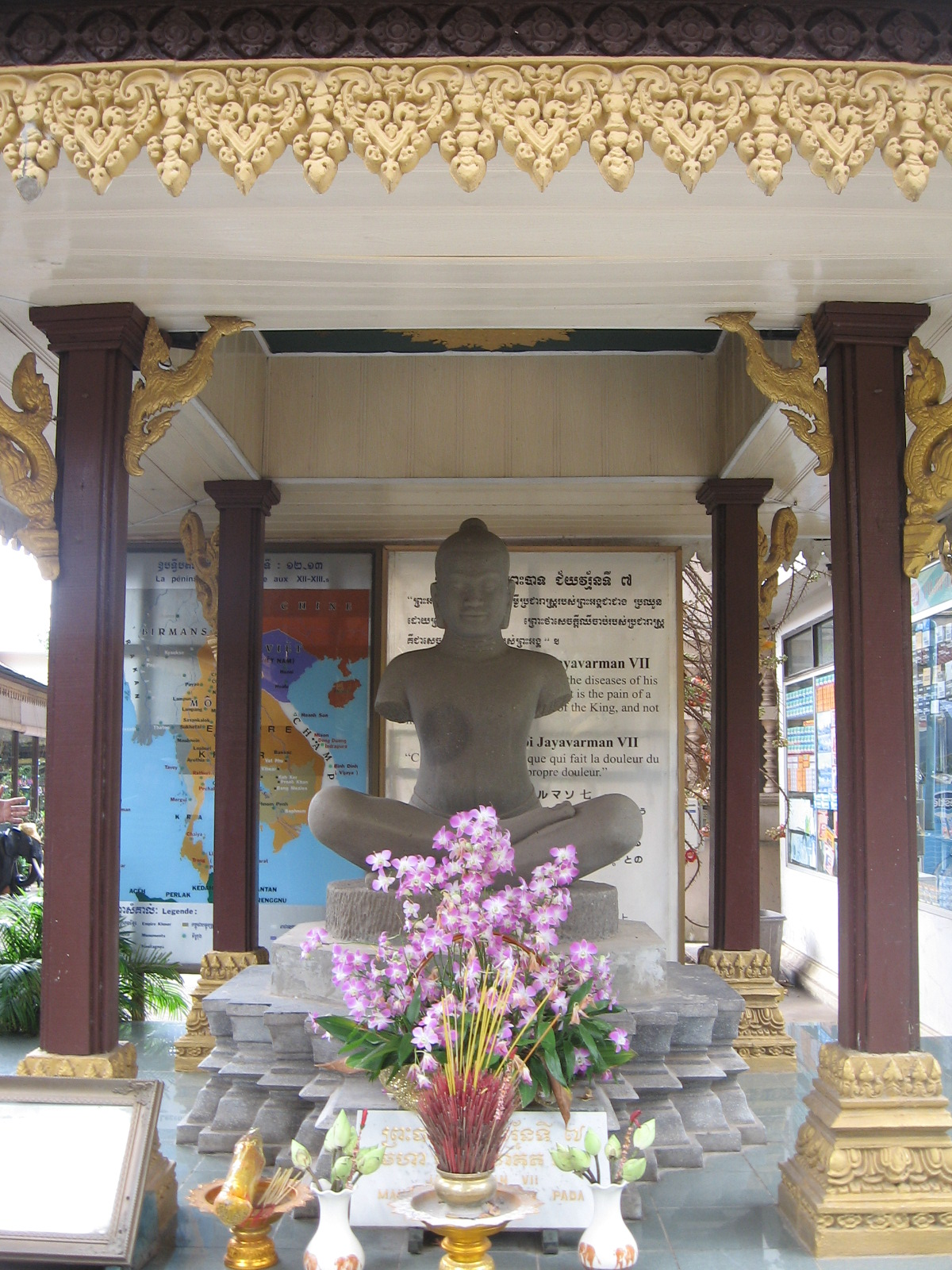 Ảnh do tác giả Phan Minh Châu chụp tại Hoàng Cung Campuchia